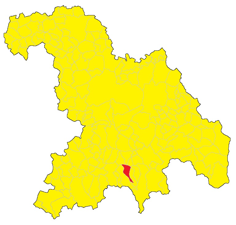 Mappa del comune di Lerma (AL)